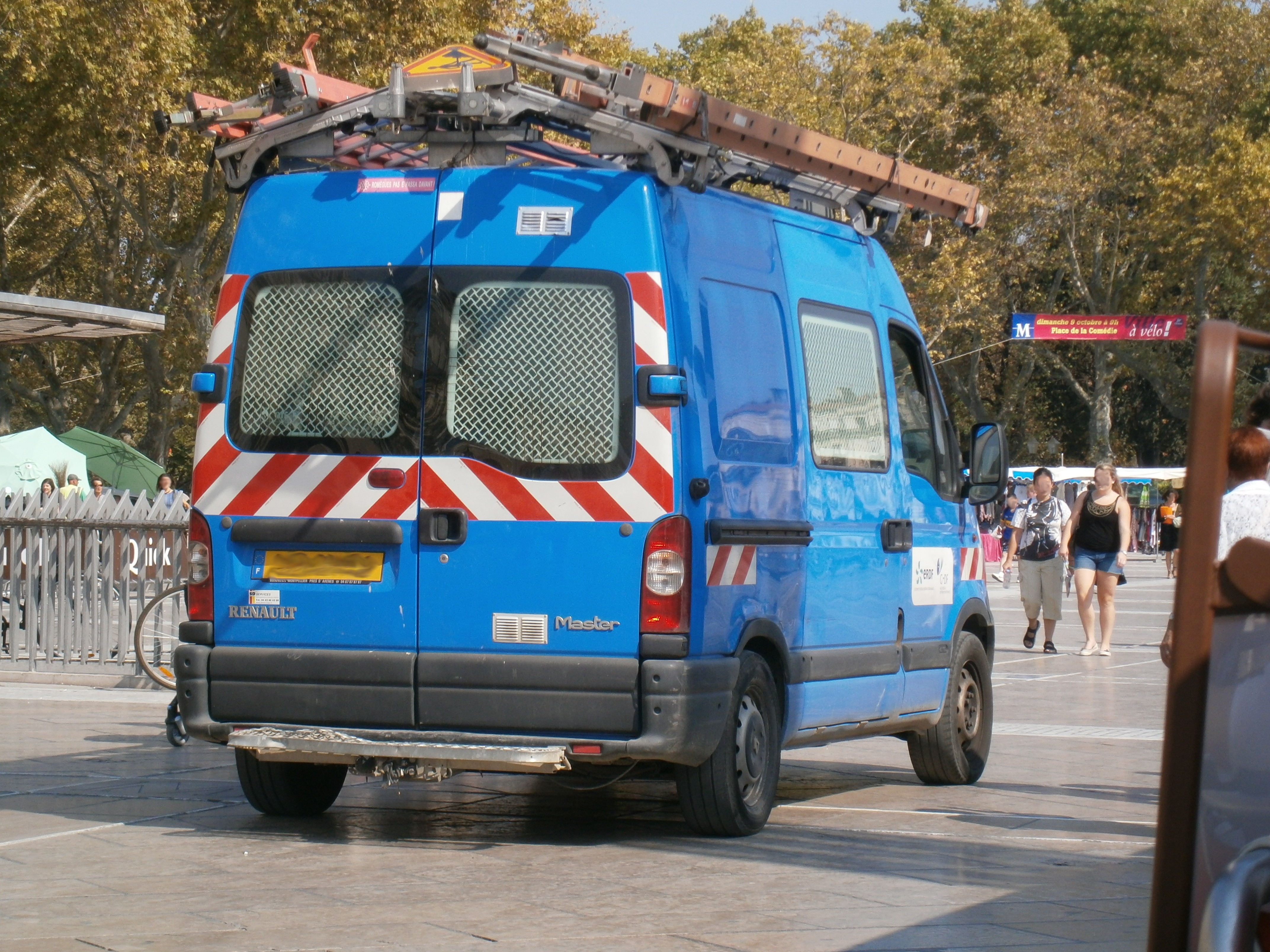 Un véhicule d'Électricité Réseau Distribution France (ERDF), à Montpellier (34).